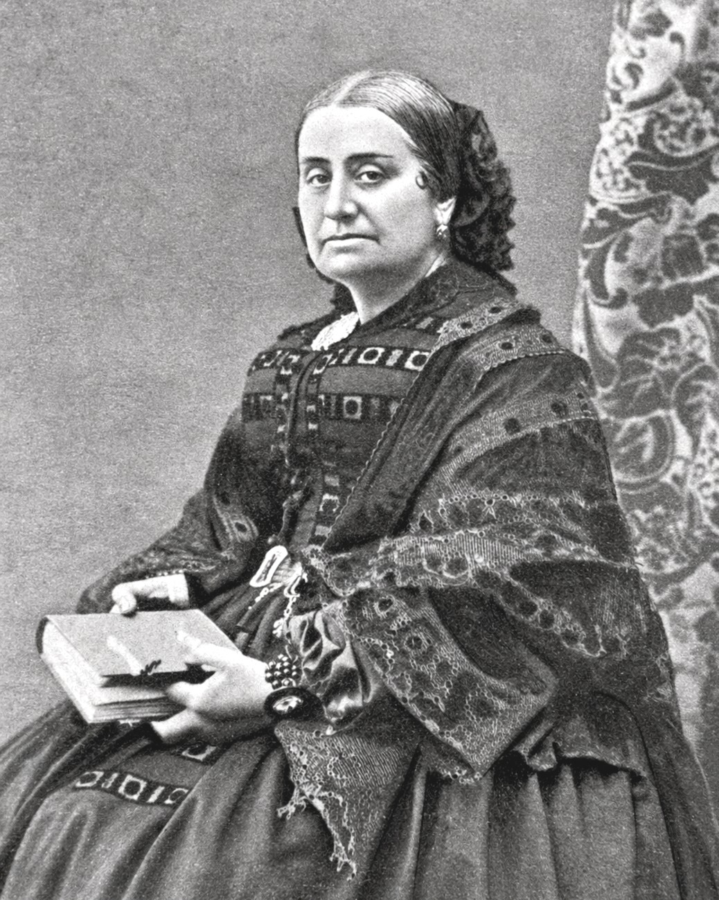 Juana de Vega (1805-1872)